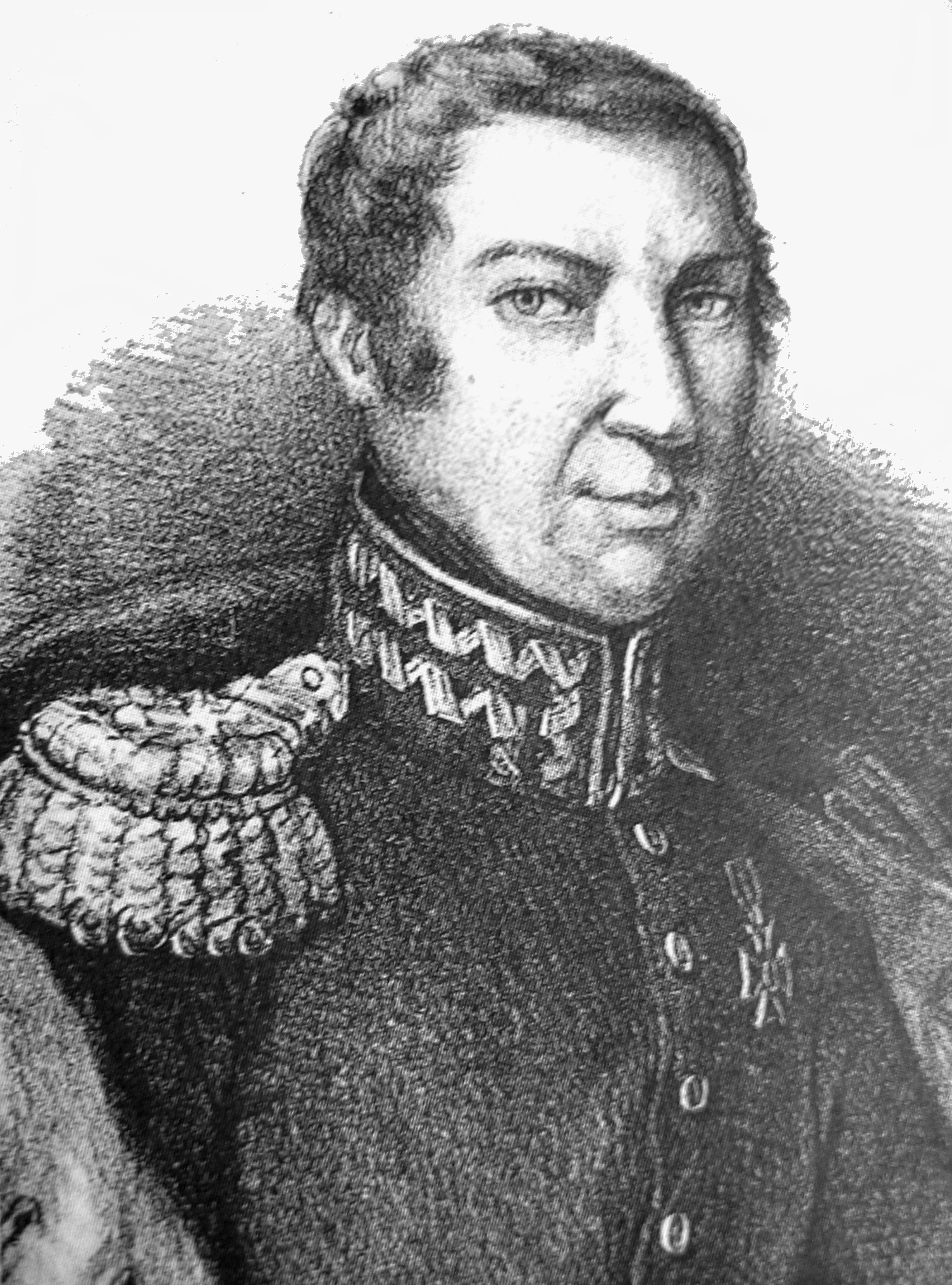 Polish General Kazimierz Małachowski (1765-1845)